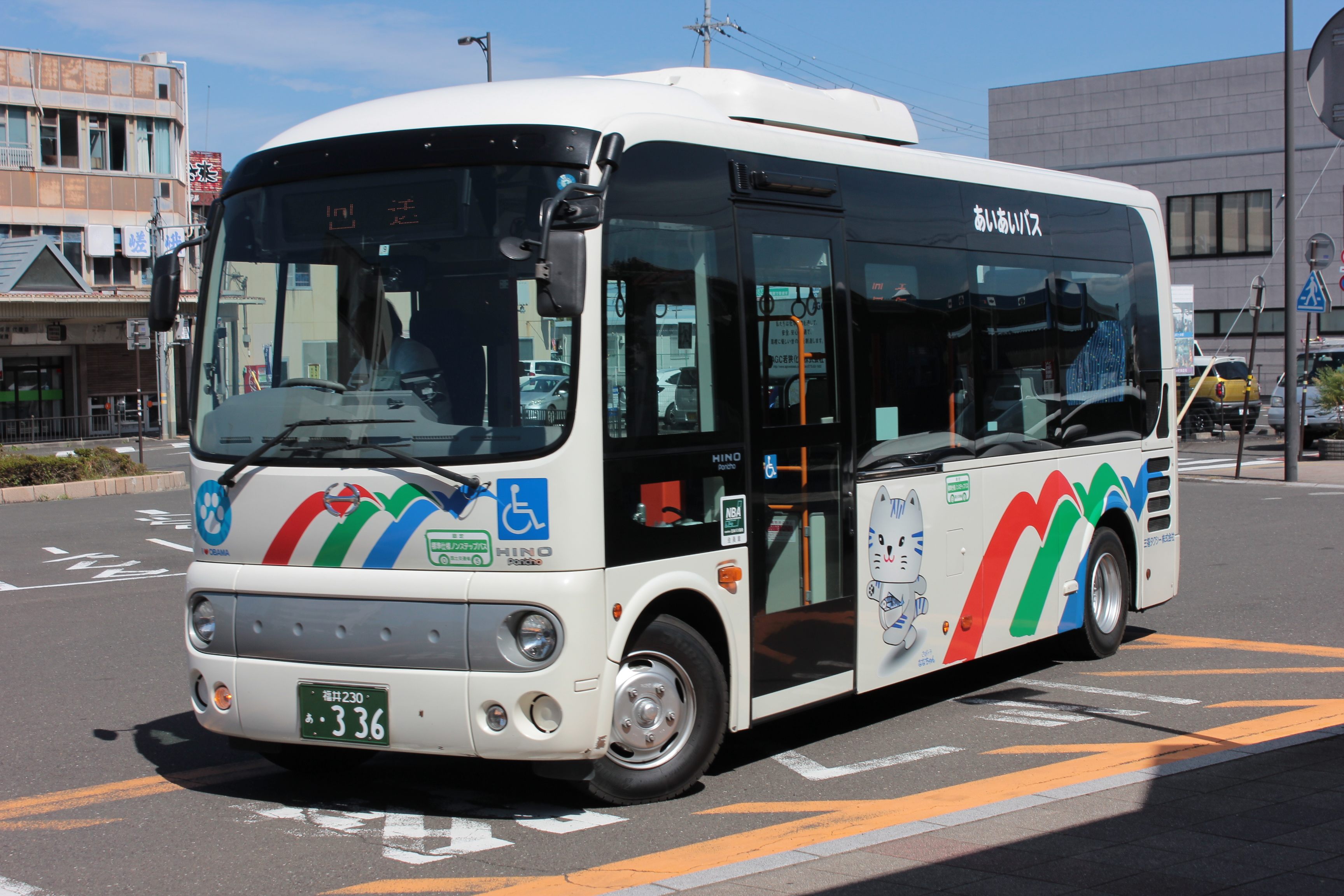 福井県小浜市のコミュニティバス「あいあいバス」（小型車両） Canon EOS Kiss X5